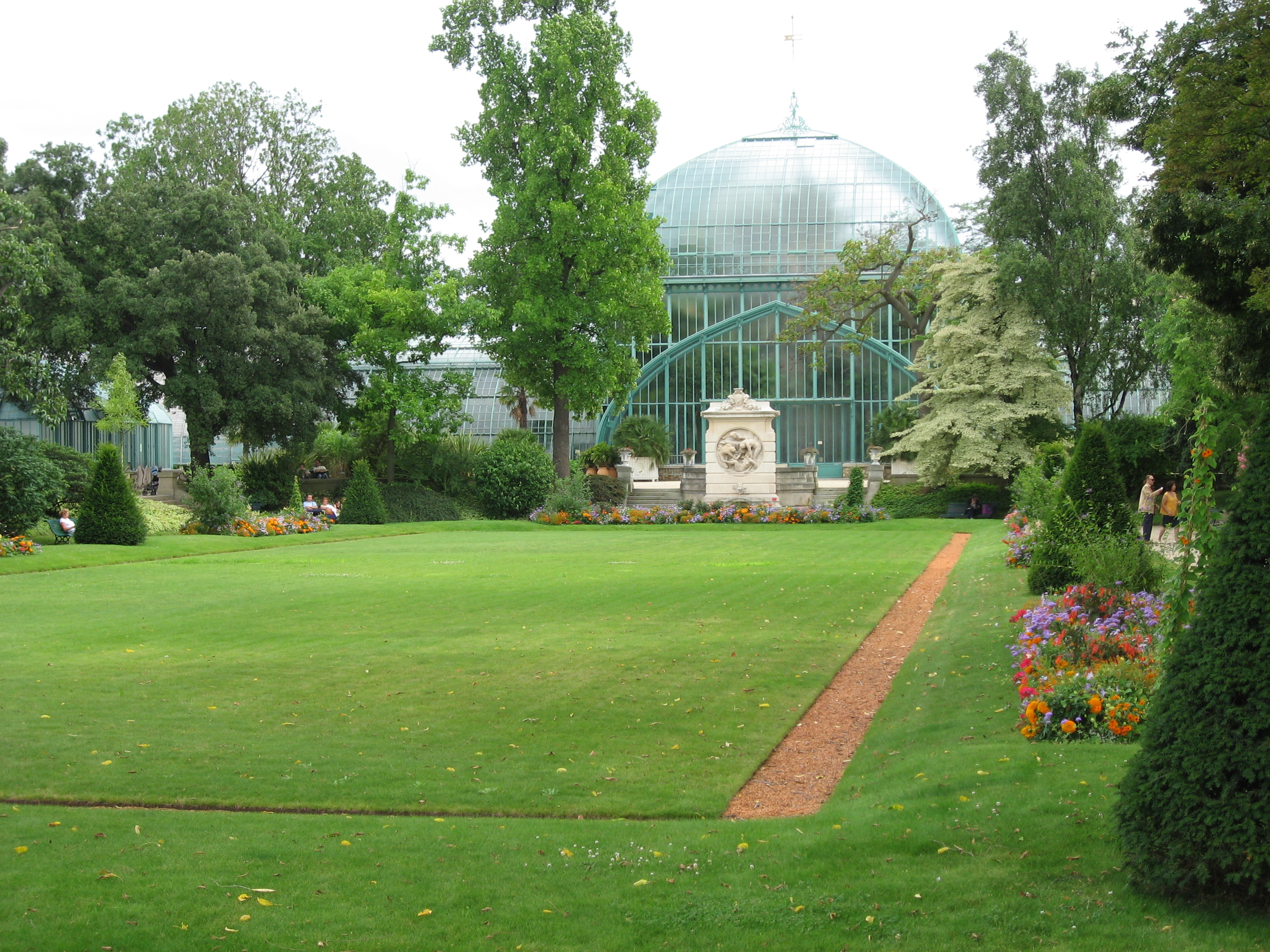 Serres d'Auteuil Map: 48° 50' 49" N 2° 15' 8" E